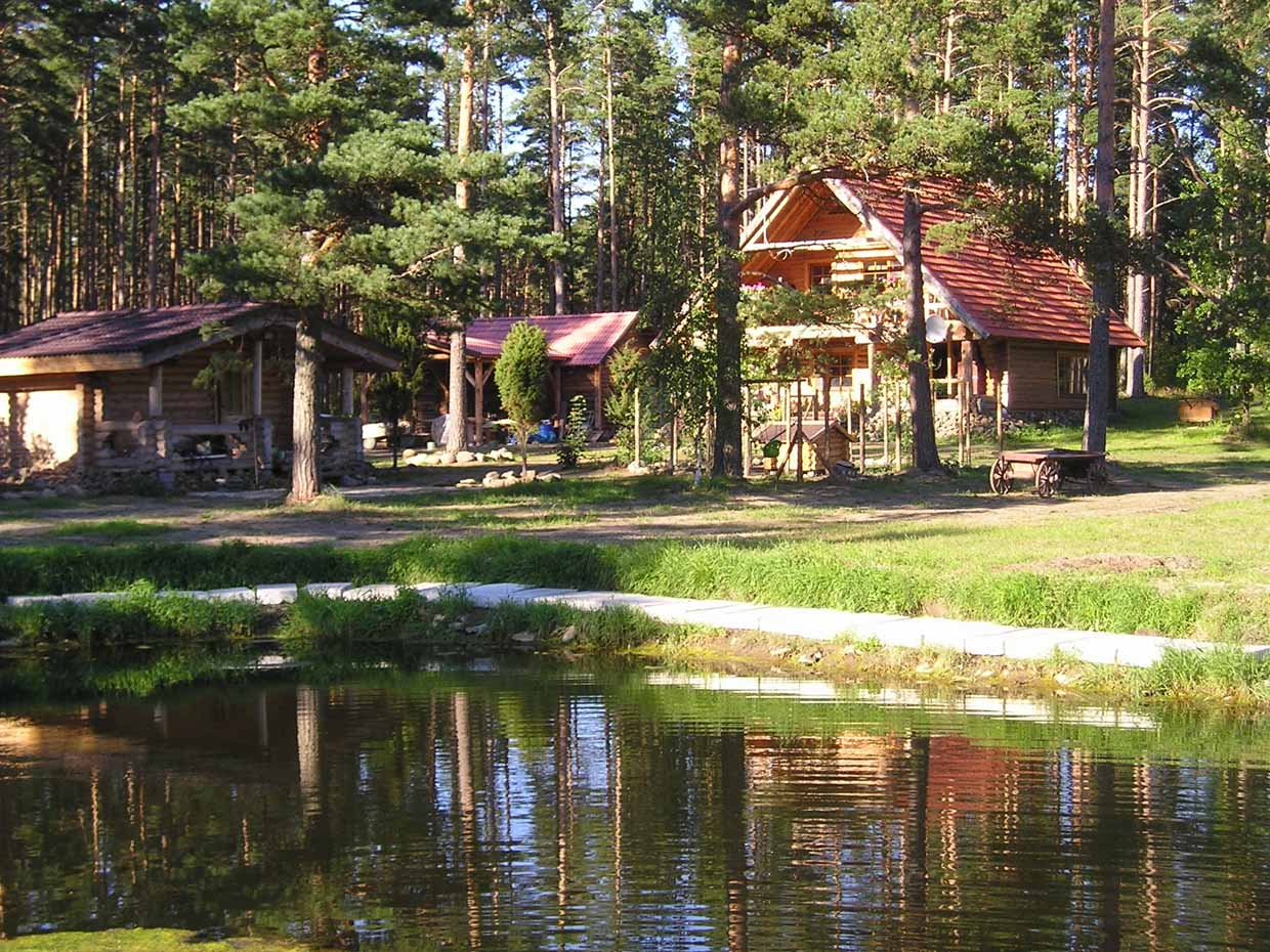 Jõekääru puhketalu